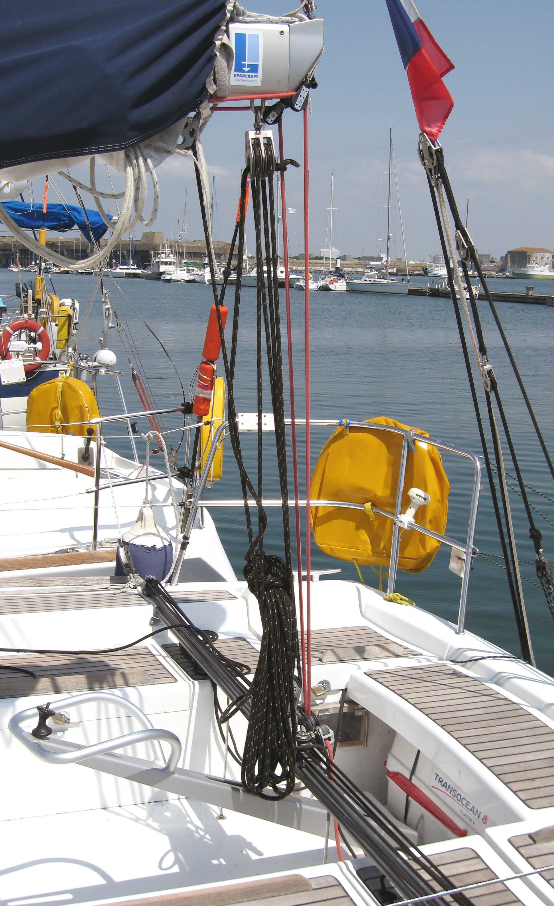 Description : Palan et chariot écoute de grand-voile Place : Lorient, France Date : 2006 Author : Pline Schéma ou photo personnelle